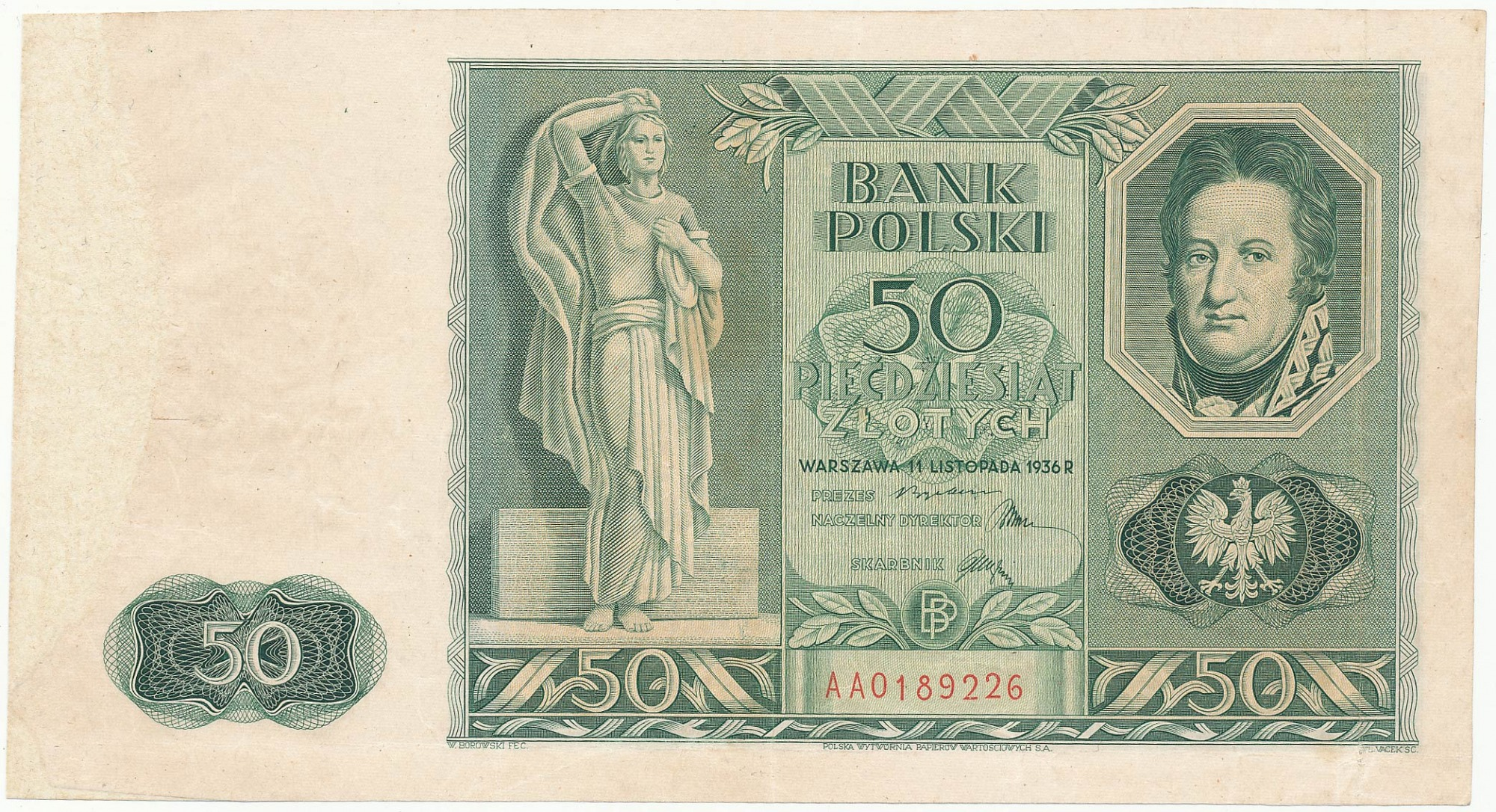 50 złotych 1936 Jan Henryk Dąbrowski awers